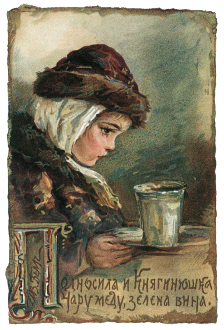 ЕЛИЗАВЕТА БЕМ. «Подносила и княгинюшка чарку меда, зелена вина»